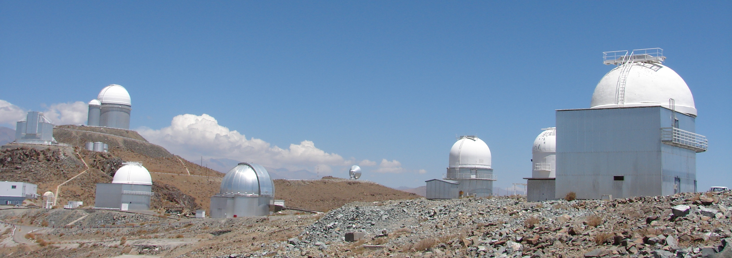 Observatorio Astronomico de La Silla